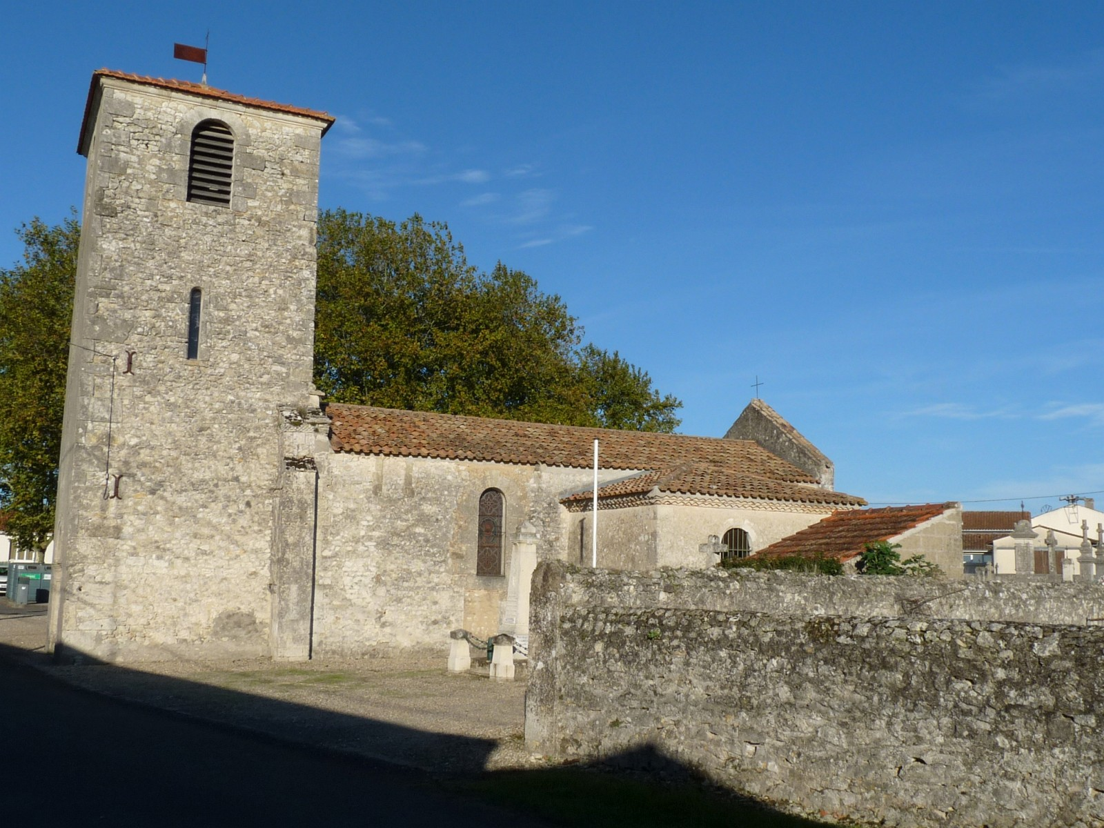 Eglise de Fours, Gironde, France